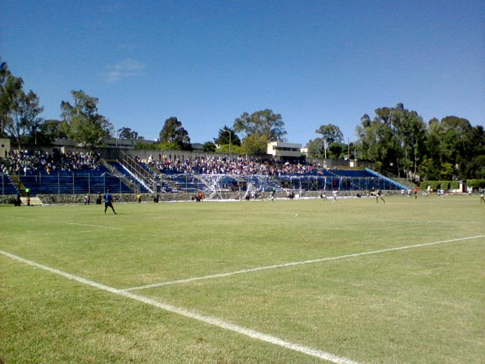 Estadio Revolucion en Ciudad Universitaria, Guatemala City.